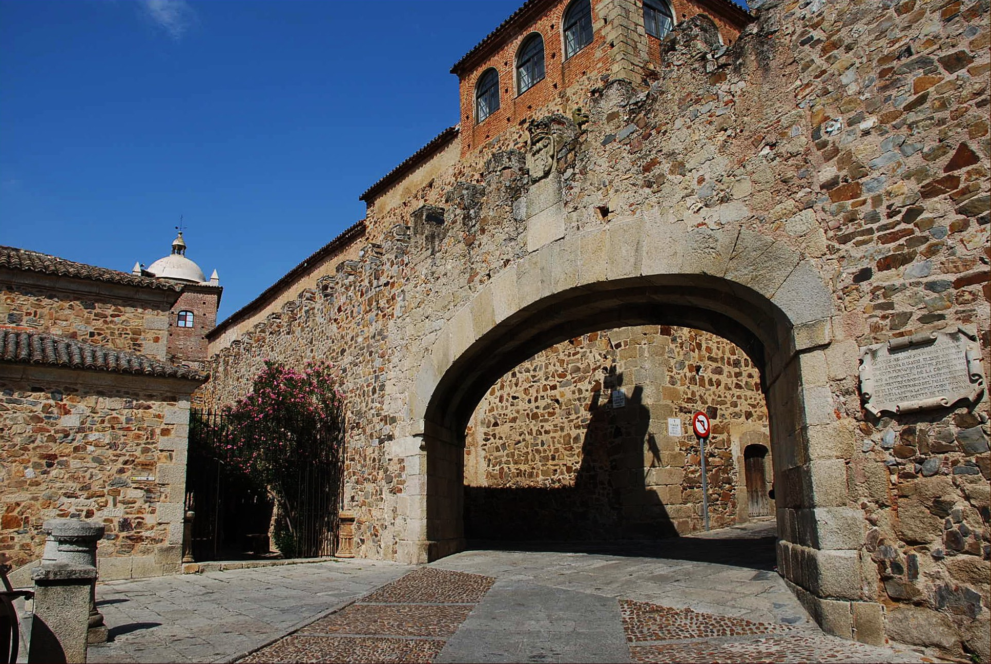 Arco de la Estrella en la muralla de Cáceres (España).